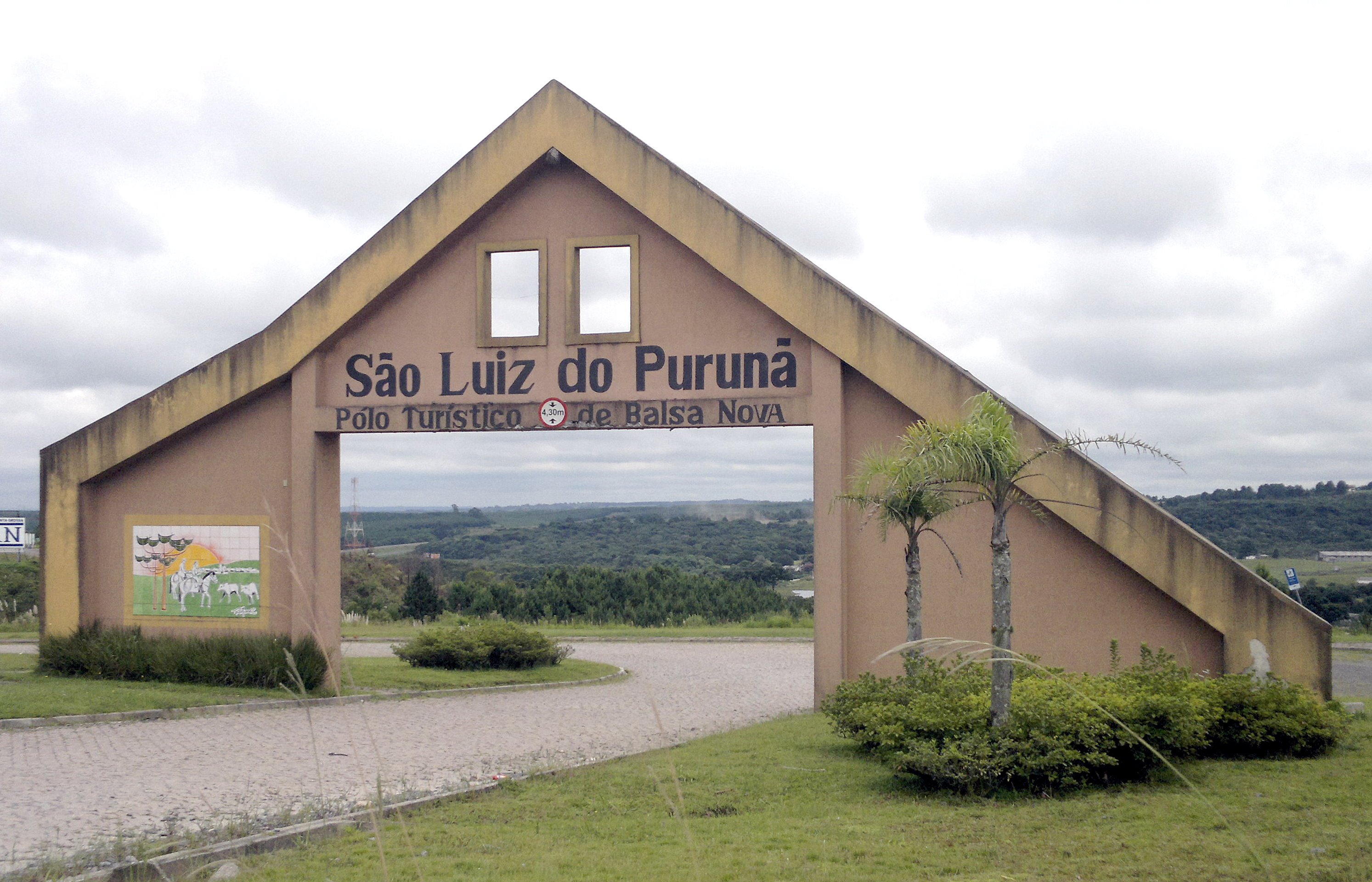 Pórtico de entrada de São Luiz do Purunã em Balsa Nova (Grande Curitiba), Paraná, Sul do Brasil.